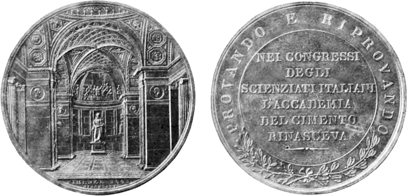 Medaglia per la terza riunione degli scienziati italiani